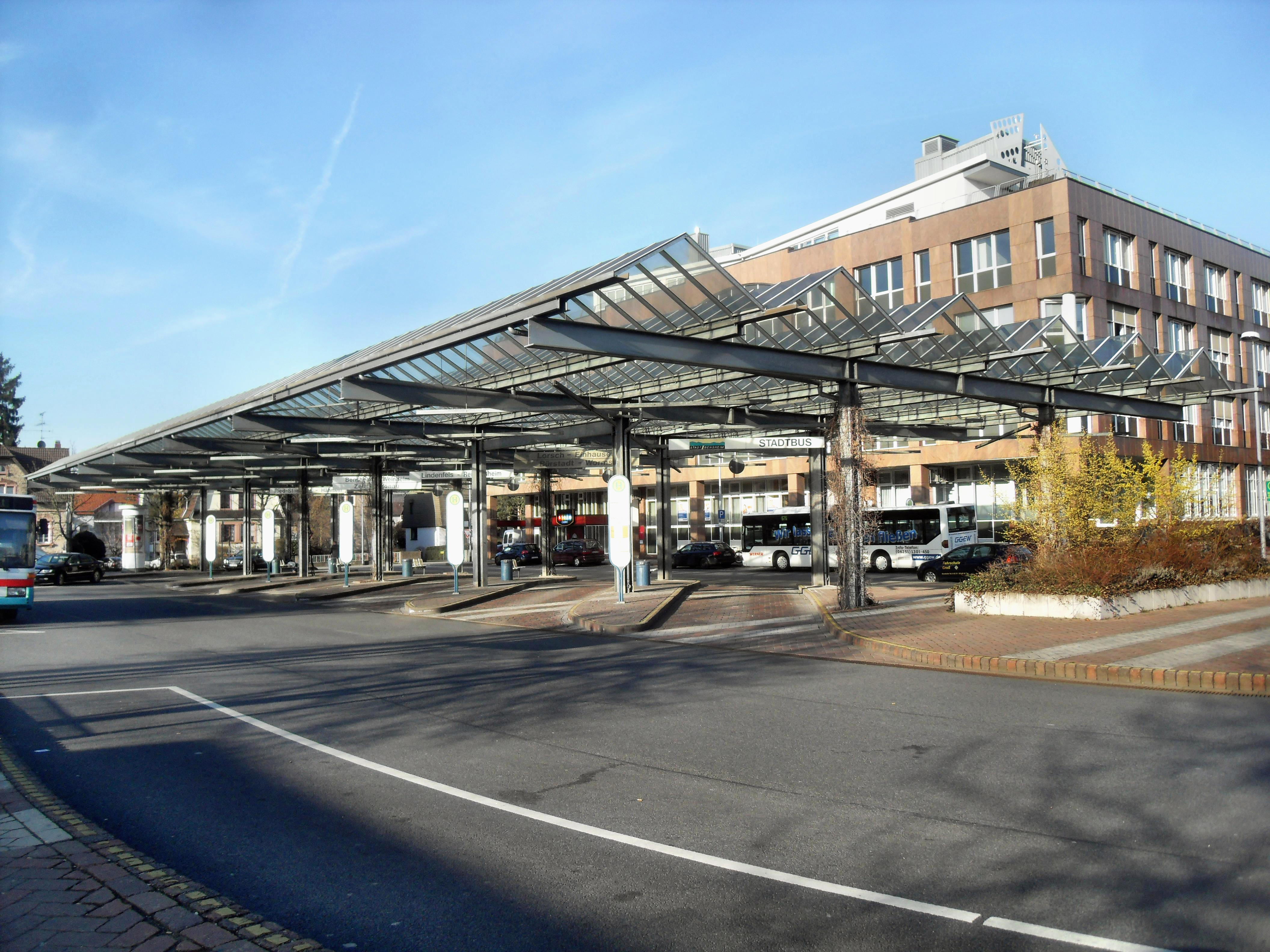 Der Bensheimer Busbahnhof in Hessen (Deutschland)